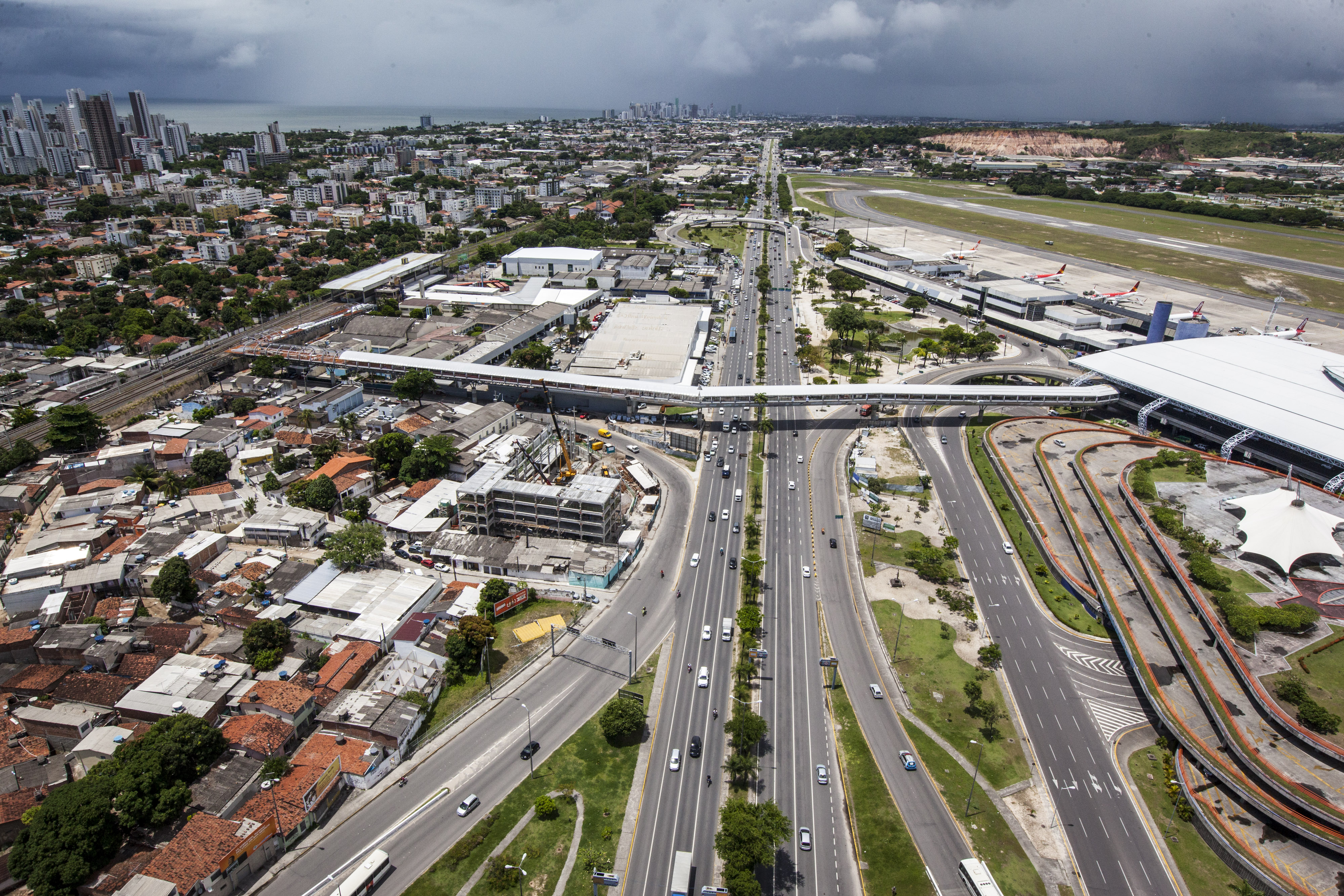 Avenida Marechal Mascarenhas de Morais e passarela do aeroporto - Recife, Pernambuco, Brasil